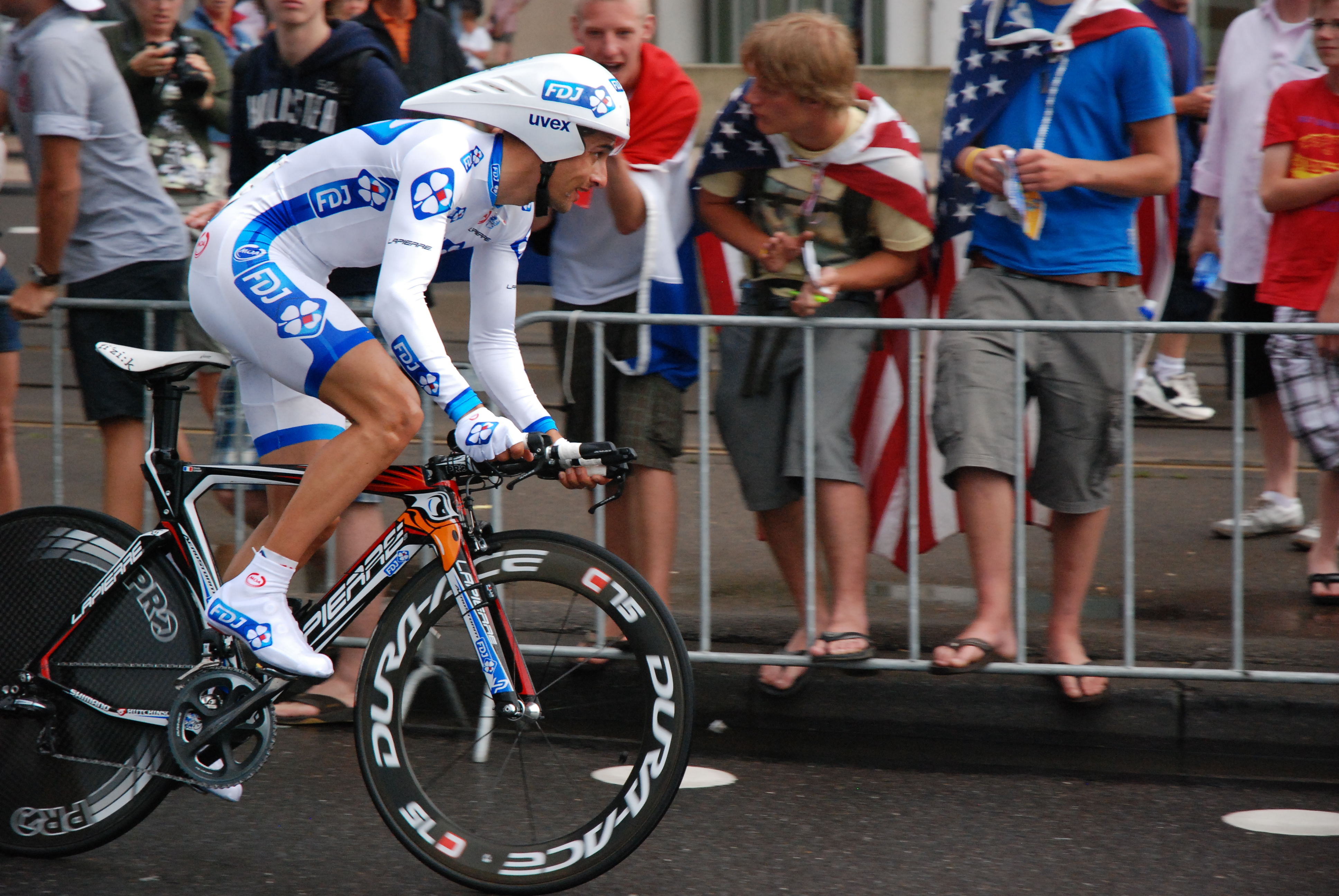 Sandy Casar durant le prologue du tour de France 2010.